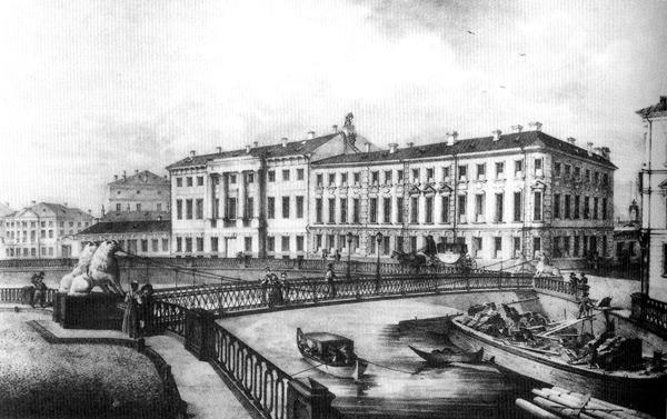 Дом на Екатерининском канале в Санкт-Петербурге (дом Алфузова №101), где временно размещался Санкт-Петербургский практический лесной институт (1823-1827)